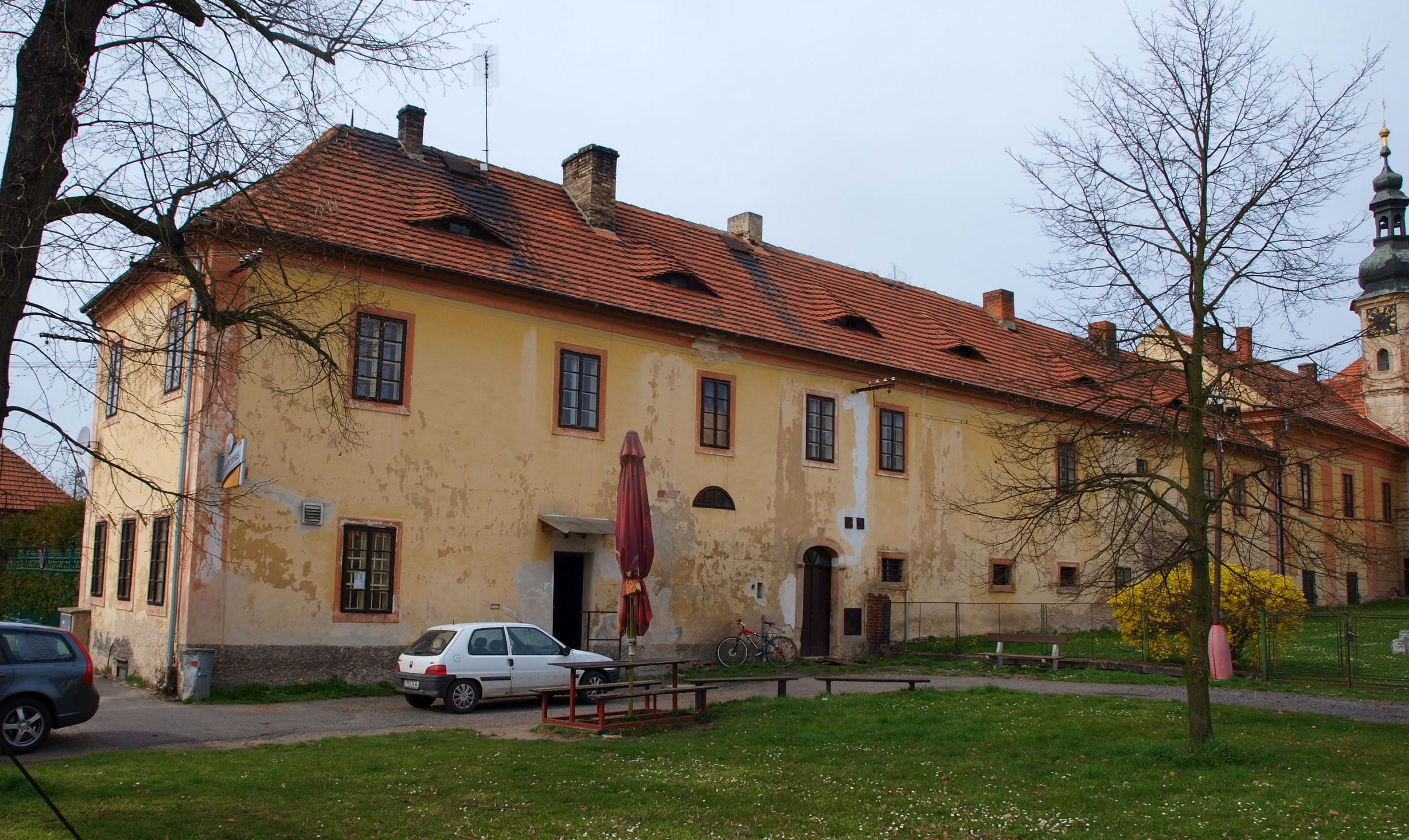 Zámek Obříství